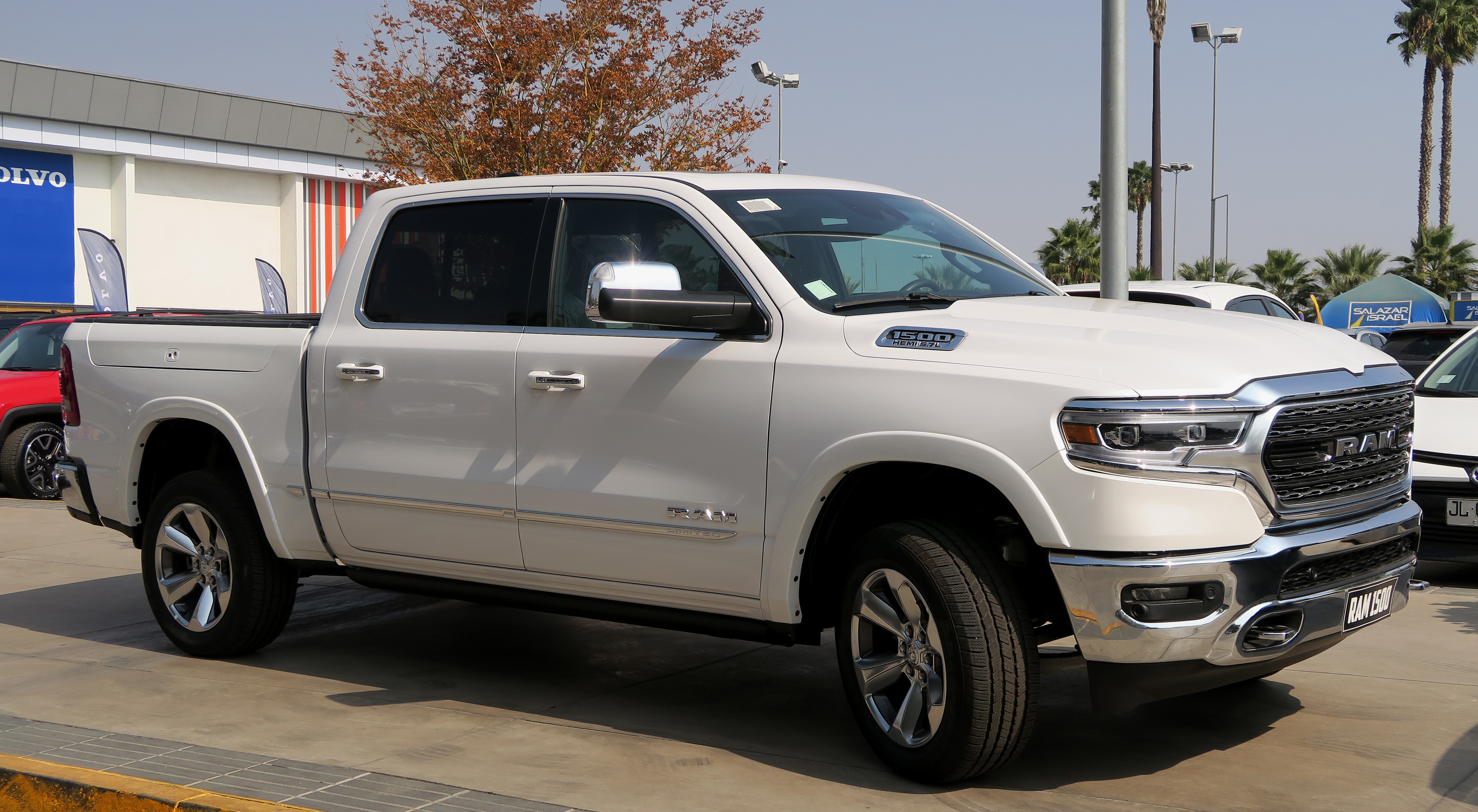 Ram 1500 Hemi Limited 2019